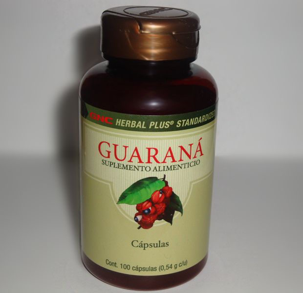 Frasco con capsulas de Guaraná